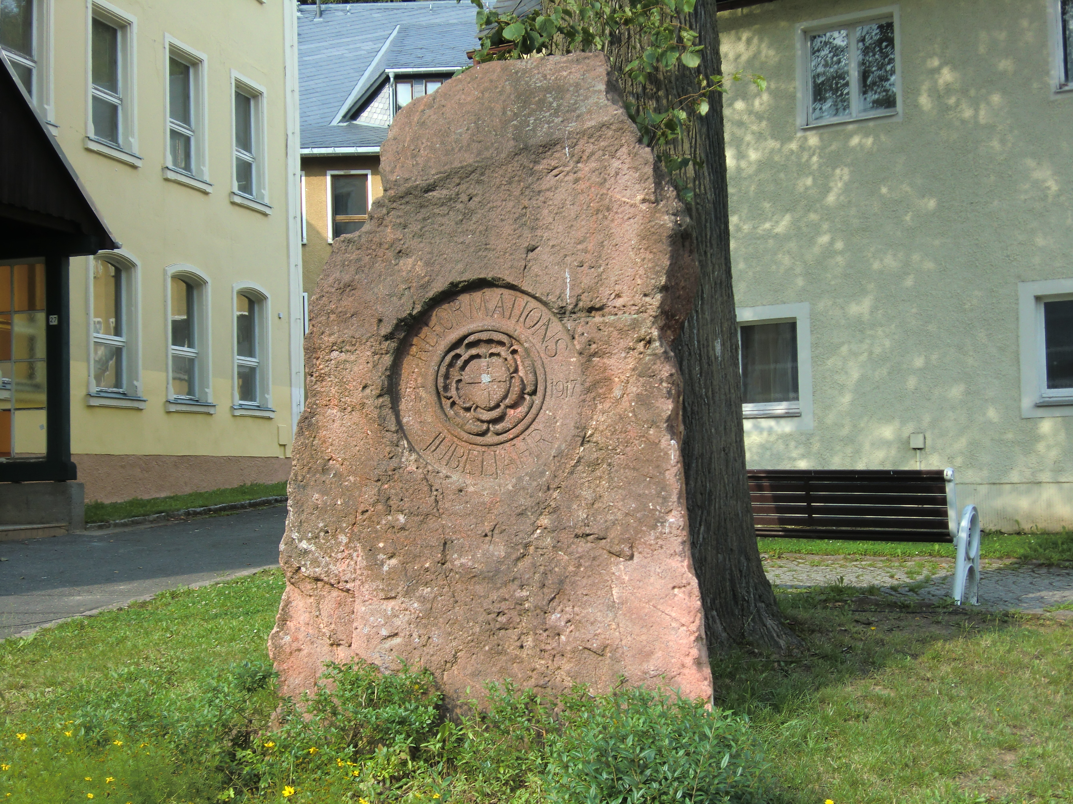 Reformationsdenkmal, Monolith, Jubeljahr 1517 - 1917